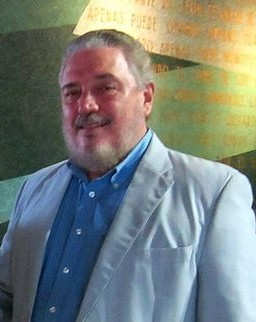 Fidel Castro Díaz-Balart